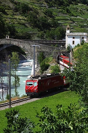 Ritibrücke mit Kapelle in Neubrück (Stalden)